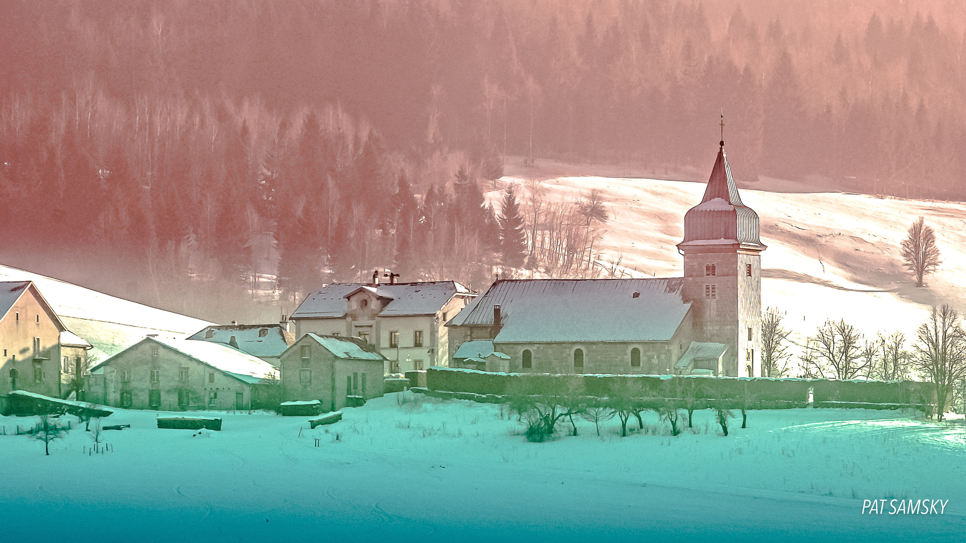 photo